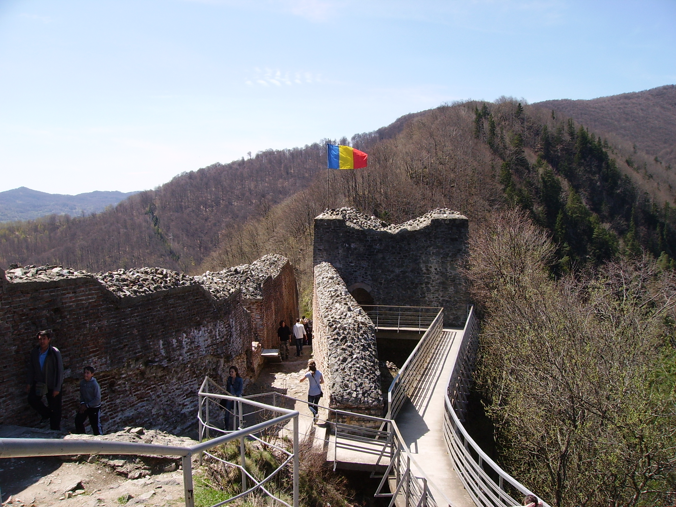 In prezent Cetatea se afla in stadiu de ruina